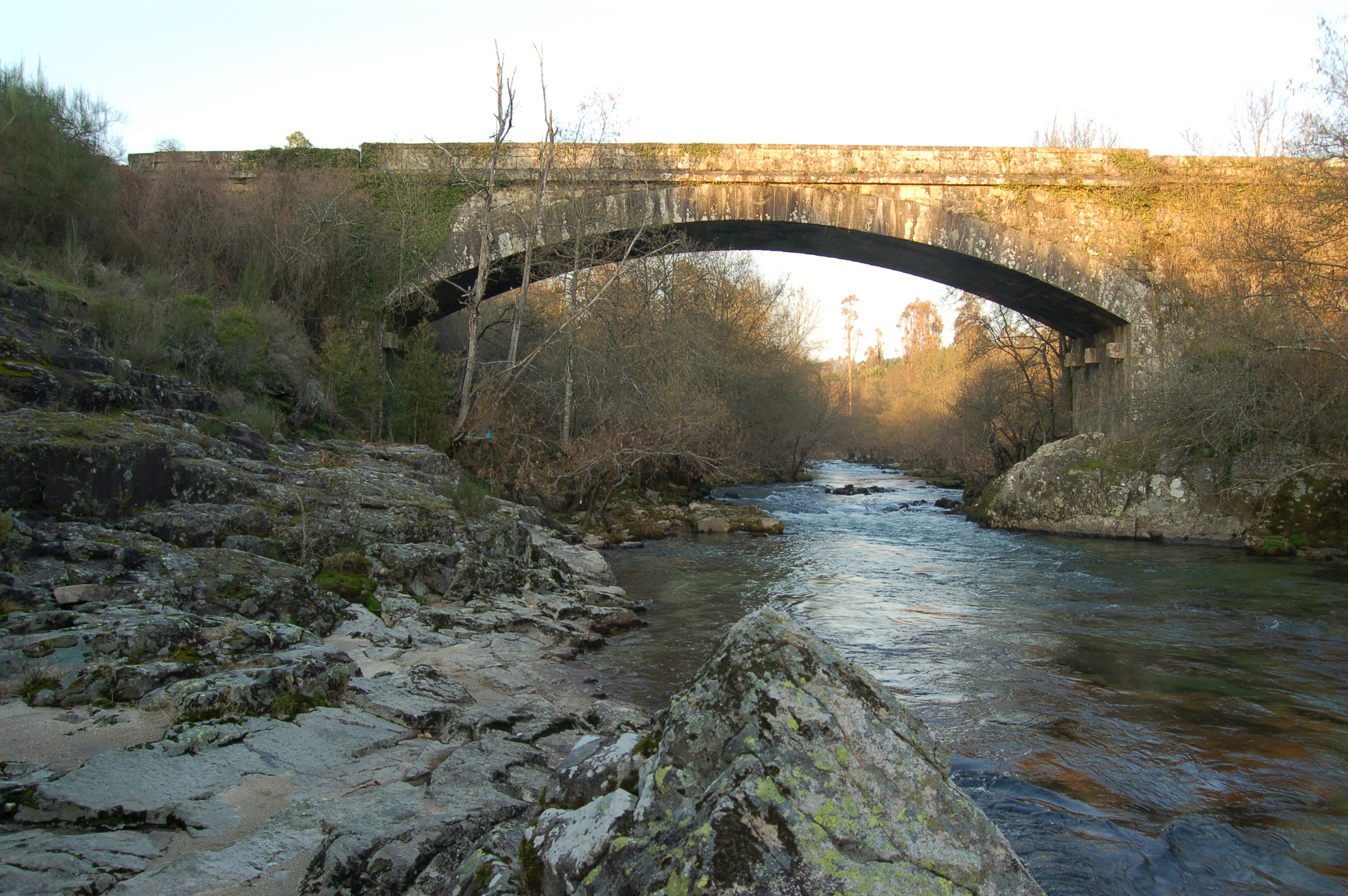 Río Tea en Ponteareas, entre as parroquias de Fozara e Pías